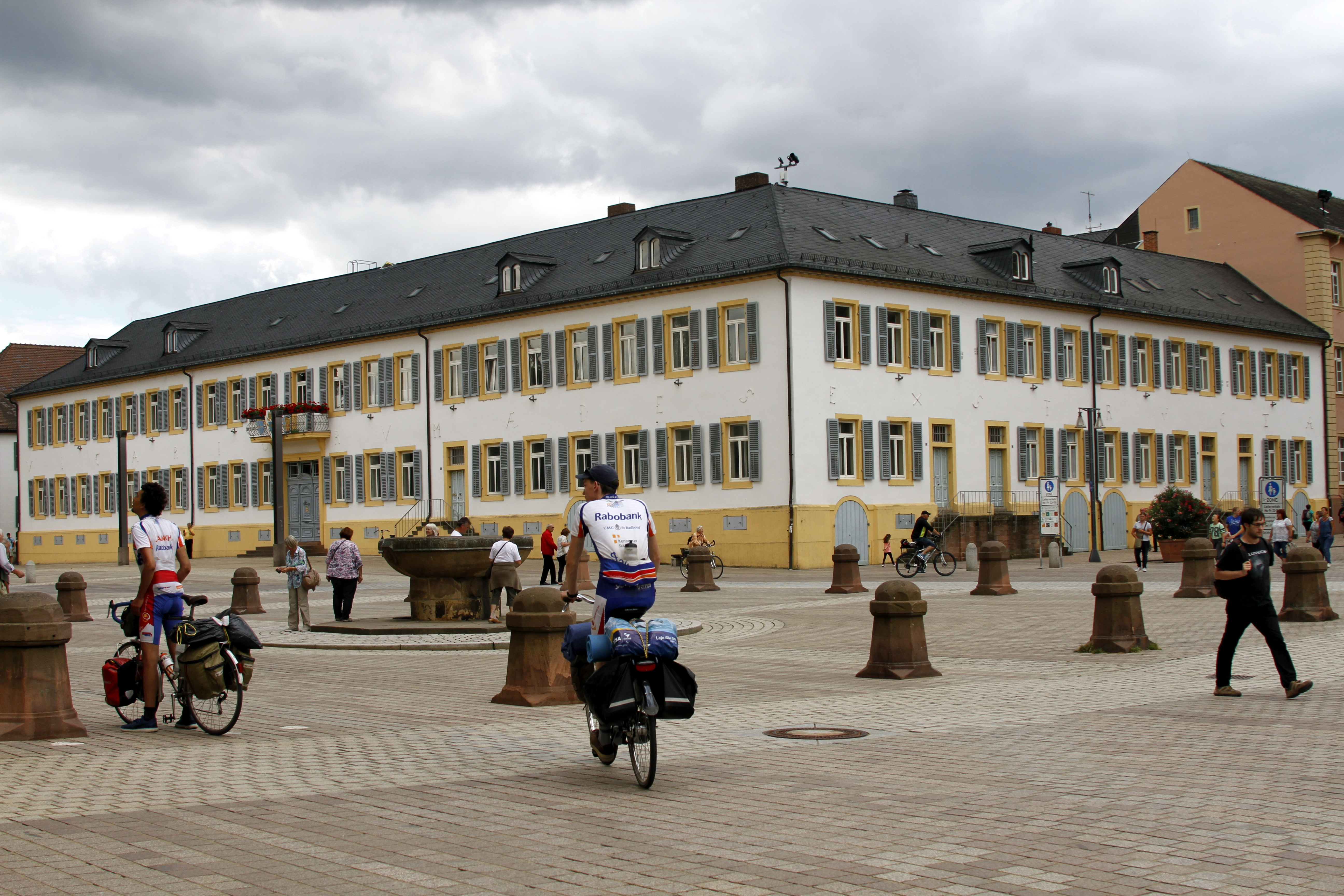 Speyer - Germany 2017